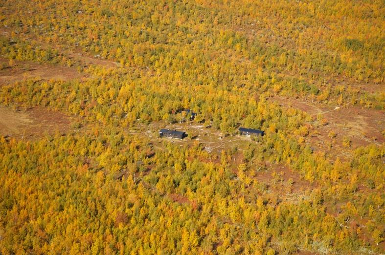 Akkastugornas turiststation vid Änonjalme sameviste. Motiv: Akkajaure Nyckelord: Flygbilder Kategori: Insjömiljöer Akkastugornas turiststation vid Änonjalme sameviste.